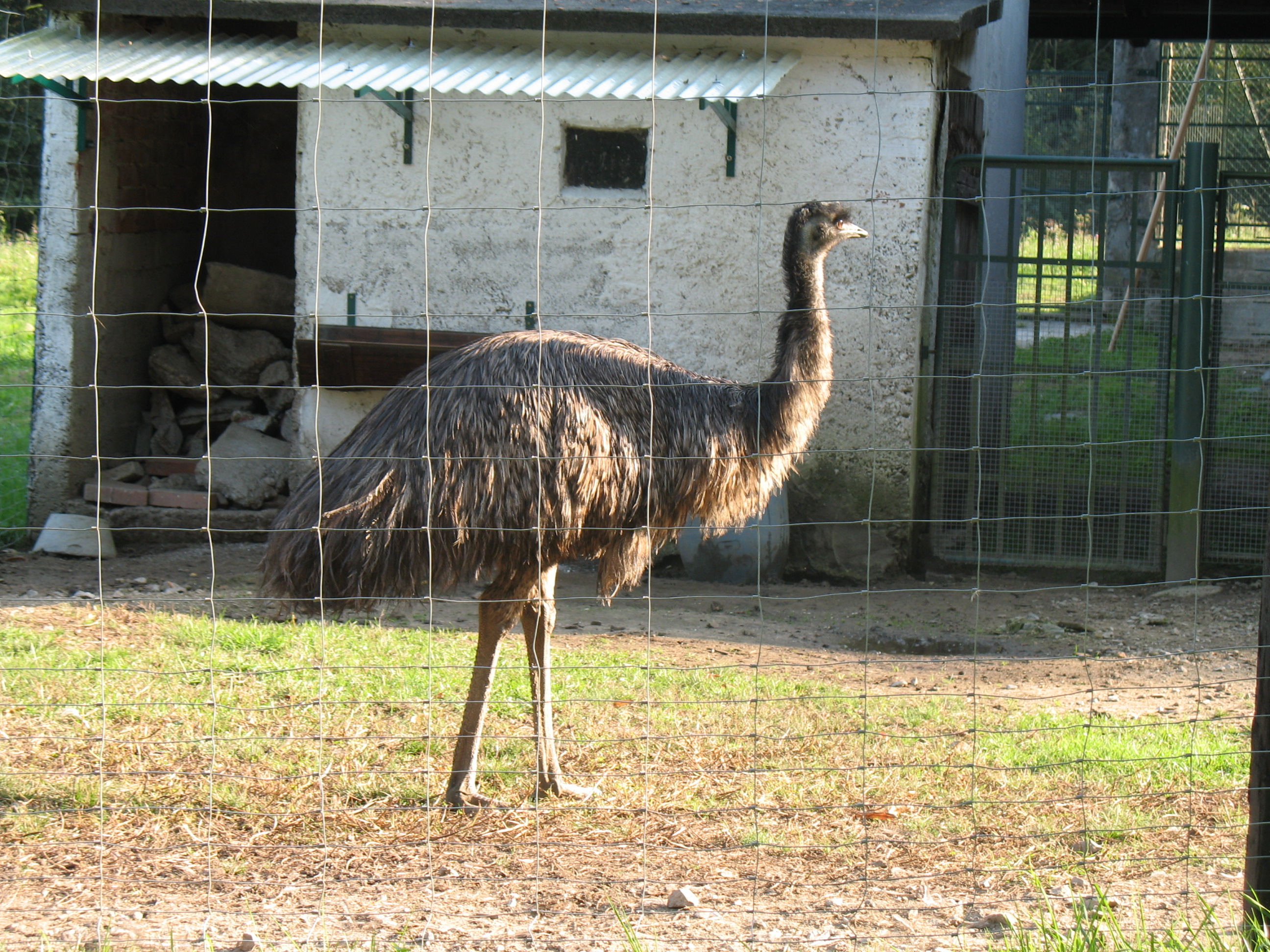 Uno emu (Dromaius novaehollandiae) in un allevamento presso Ailoche, in provincia di Biella, Piemonte, Italia)